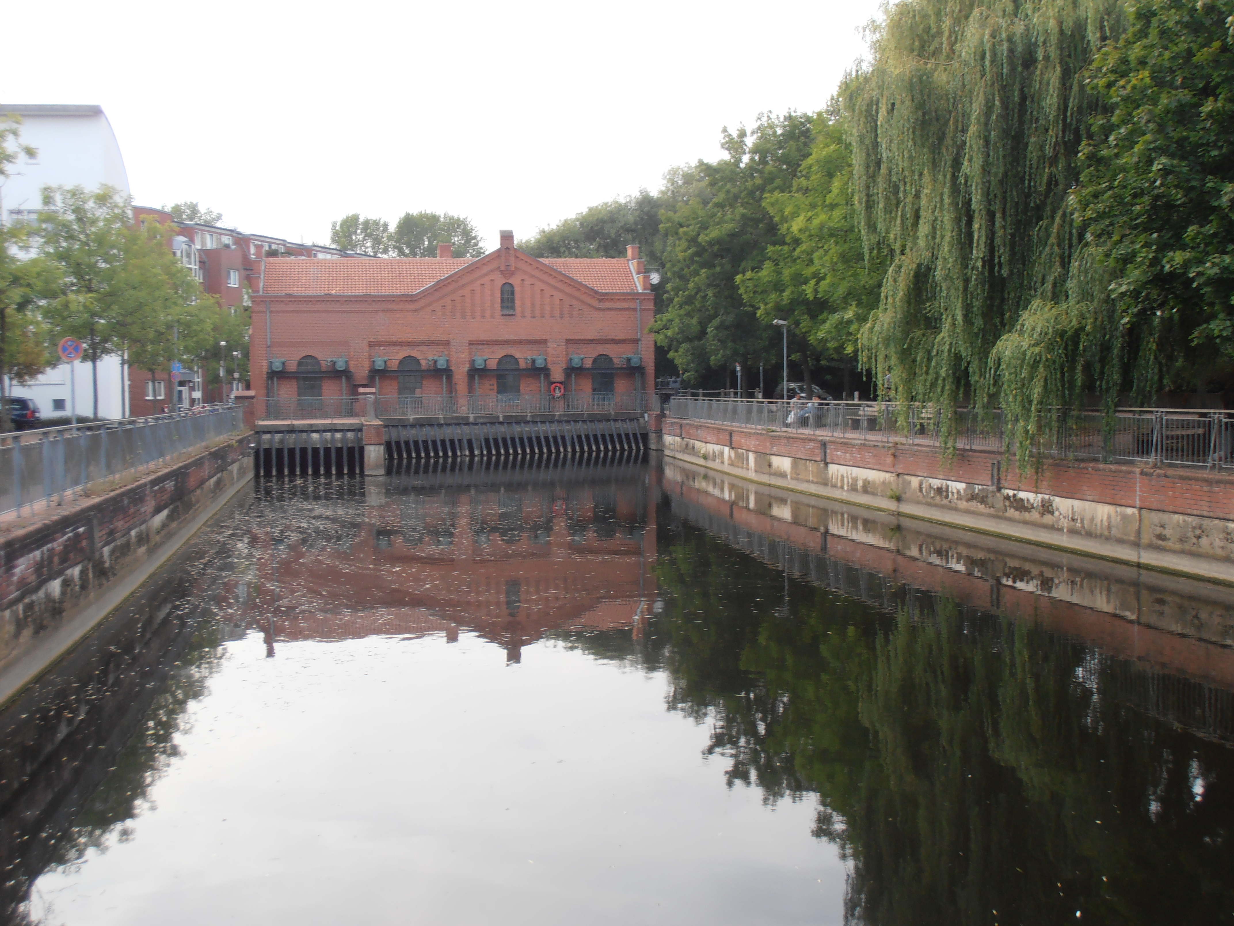 Ehemaliges Turbinenhaus der Döhrener Wollwäscherei und -kämmerei